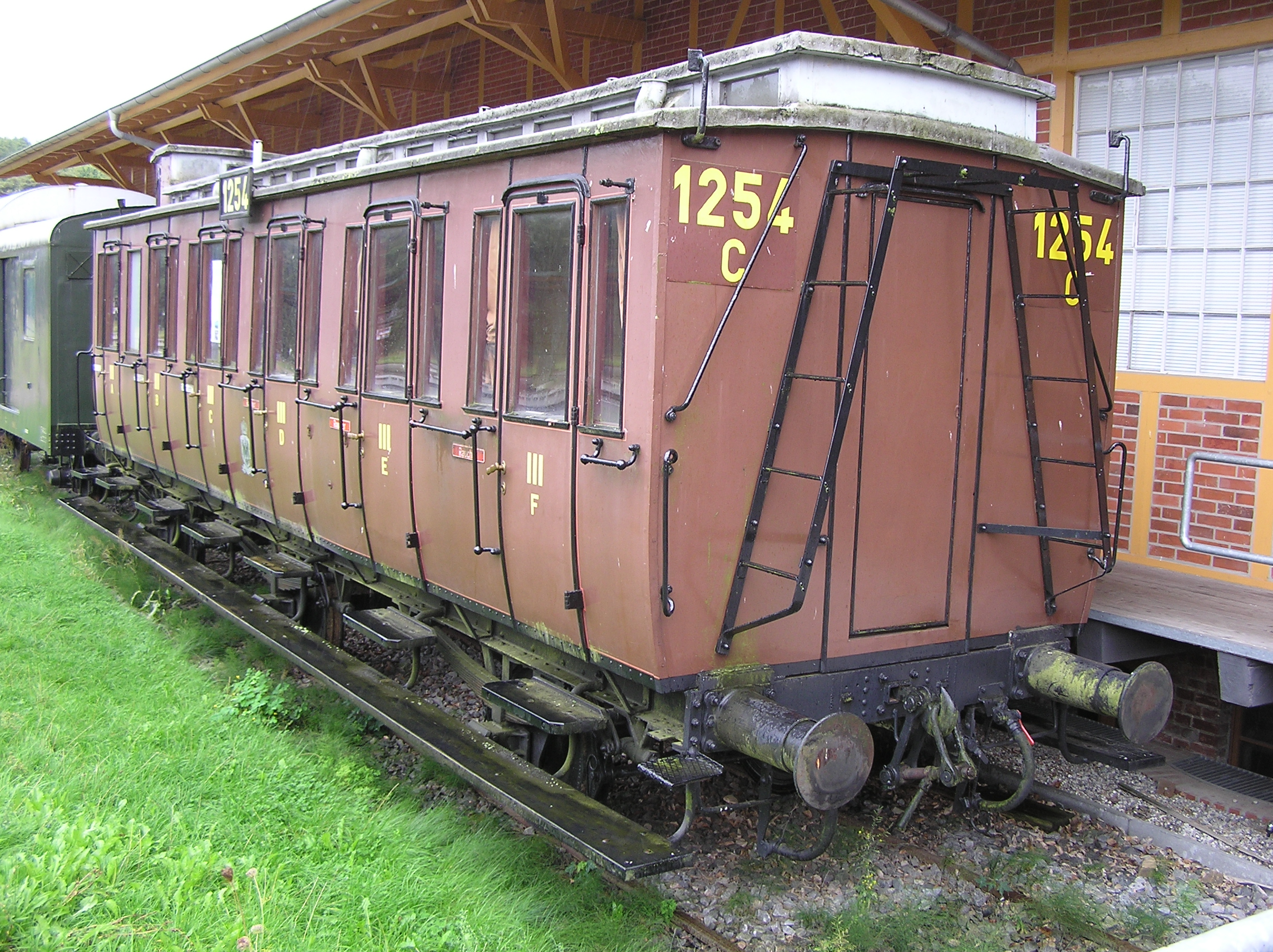 preuss_Abteilwagen_C3 (im Bahnhof Heringsdorf/Usedom)